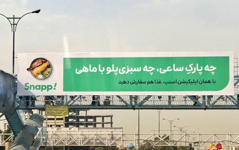 کمپین تبلیغاتی اسنپ در تیر ۱۳۹۹